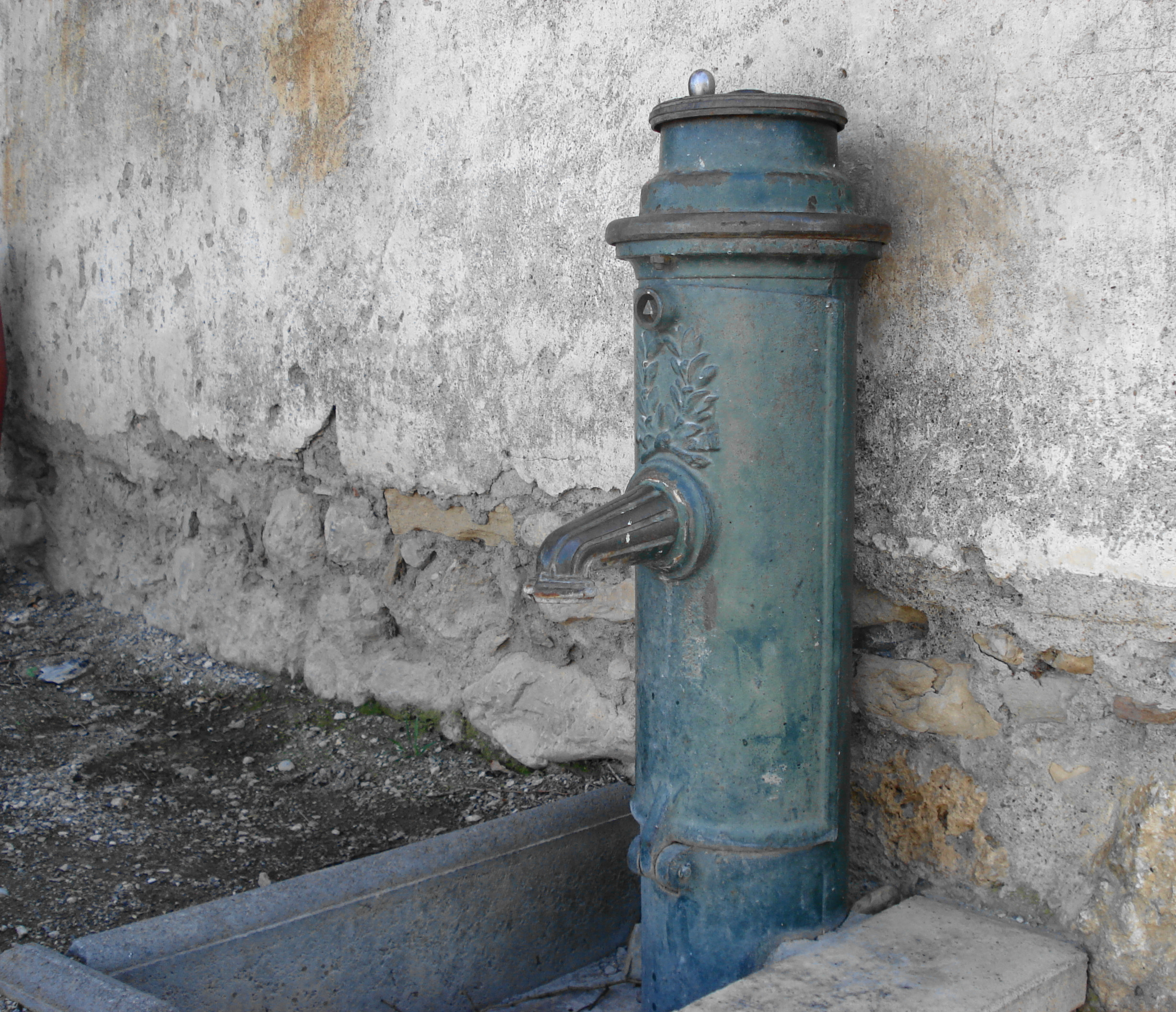 Photo d'un robinet public de distribution d'eau potable